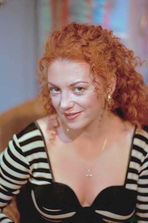 Sylvia Millecam 1995